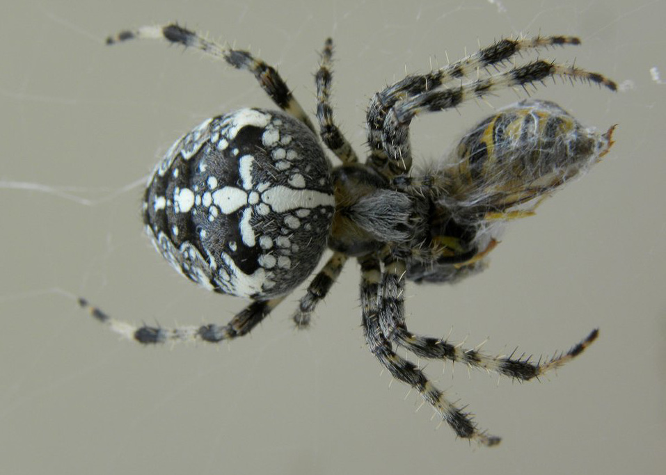 Krzyżak ogrodowy - samica